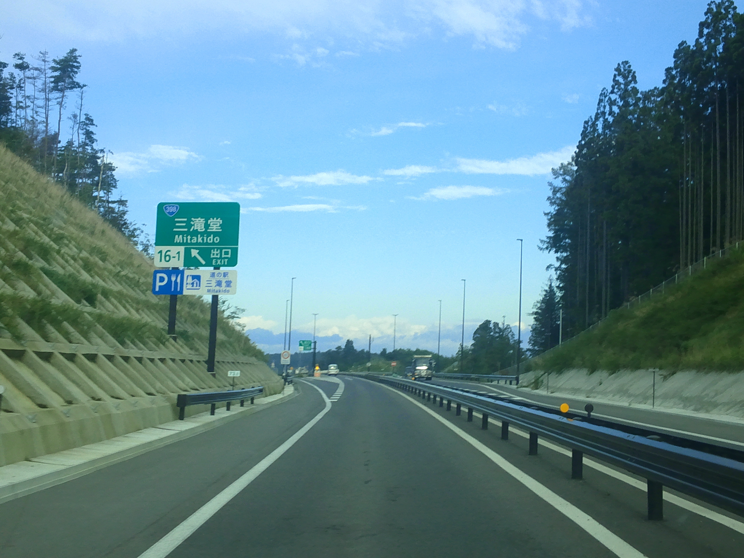 三陸自動車道三滝堂IC（上り）出口付近